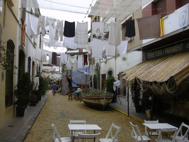 Parte del pueblo resistente de la invasión pirata. Calle Sant Antoni, Premià de Mar.